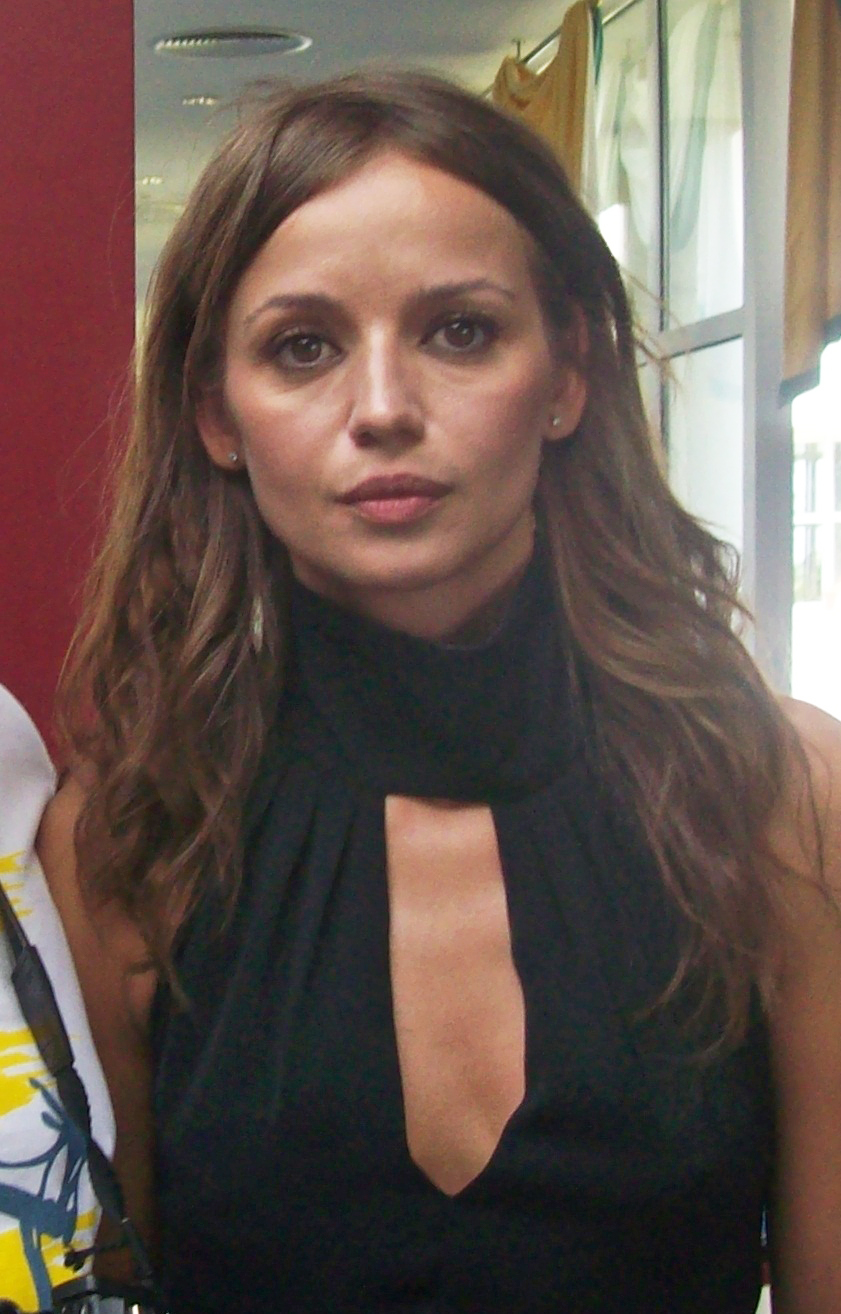 Anna Przybylska, 6 lipca 2012.